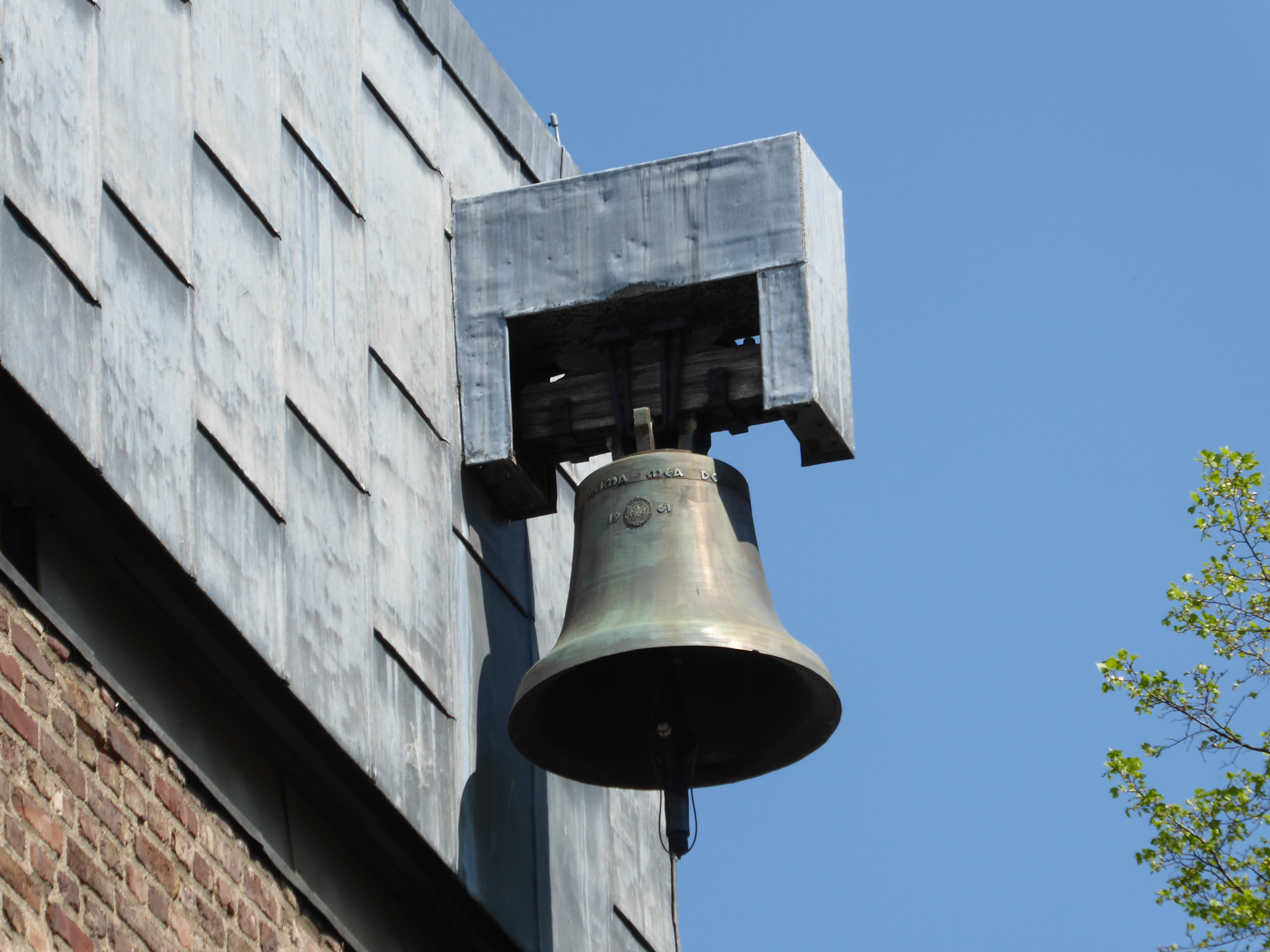 St. Laurentius (Köln-Lindenthal)